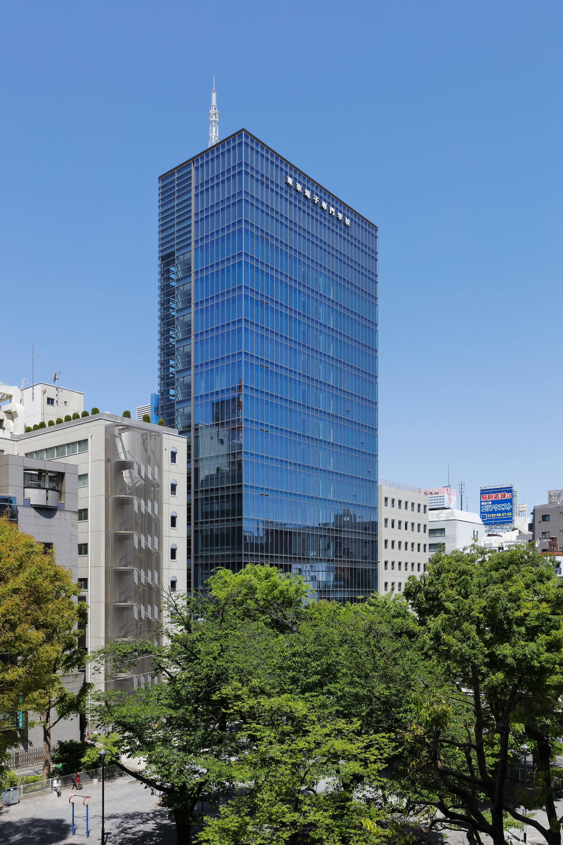 東京電子専門学校1号館